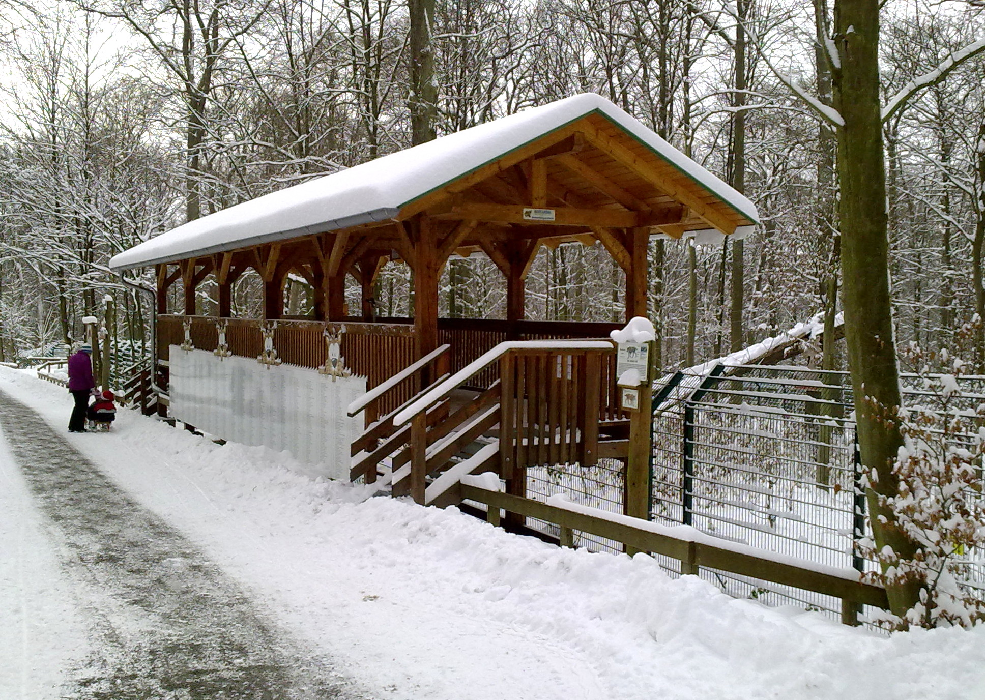 Wildpark im Winter Luchsgehege